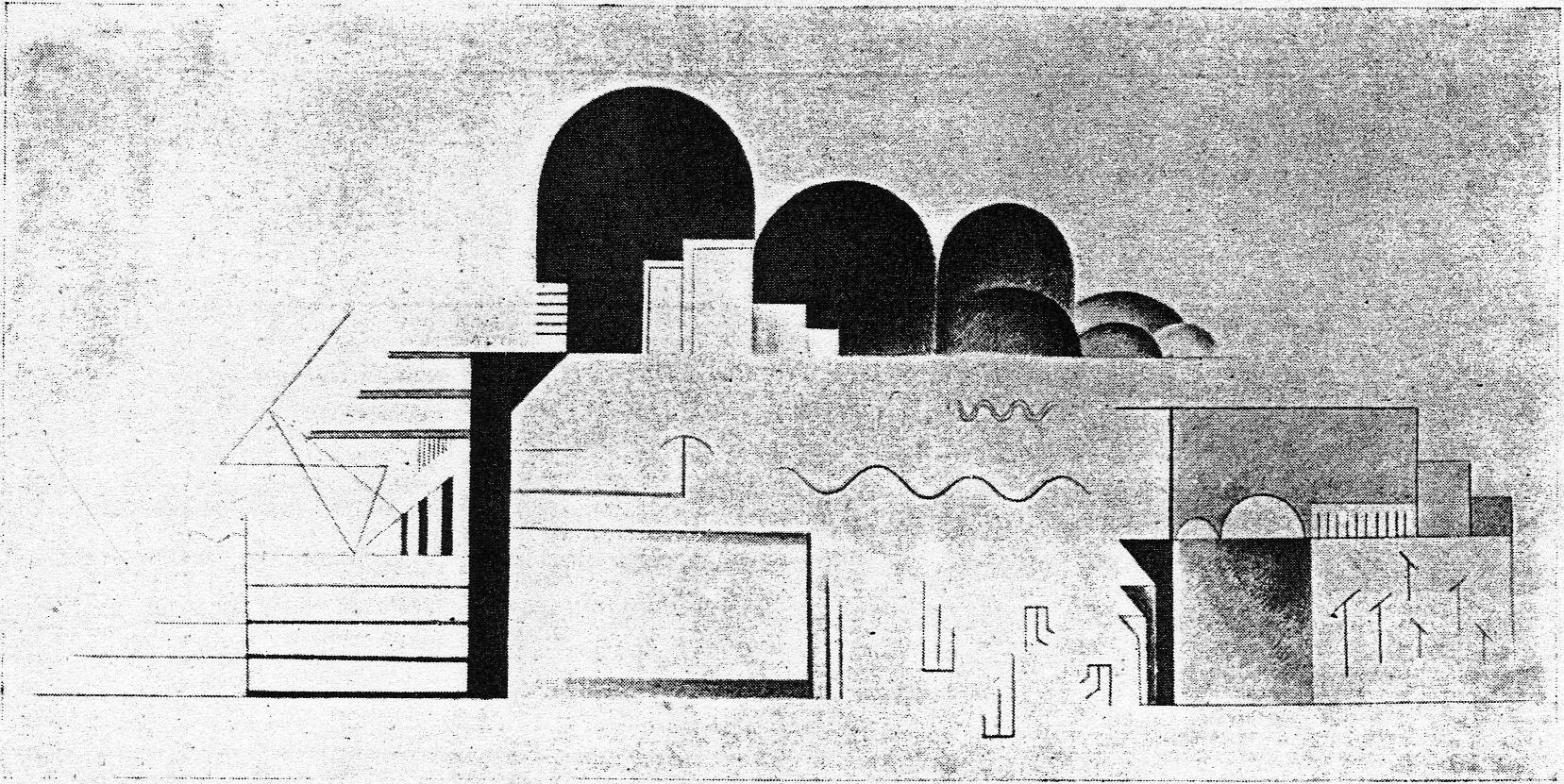 Viking Eggeling. Mid-section. c 1921. From De Stijl, vol. 4, nr, 5 (May 1921): p. 74.